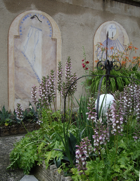 Villa La Casamaures — Cadrans solaires de l'Atelier Tournesol association spécialisée dans la Gnomonique